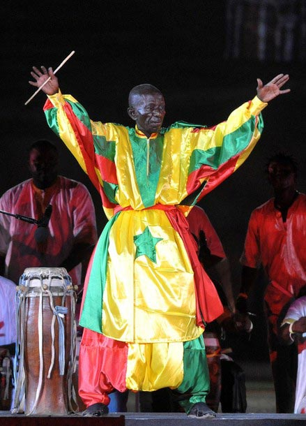 Doudou Ndiaye Coumba Rose Fesman